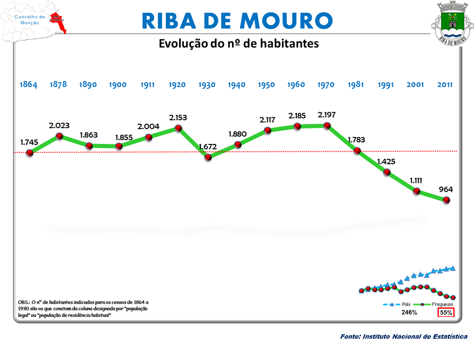 Censos 1864/2011